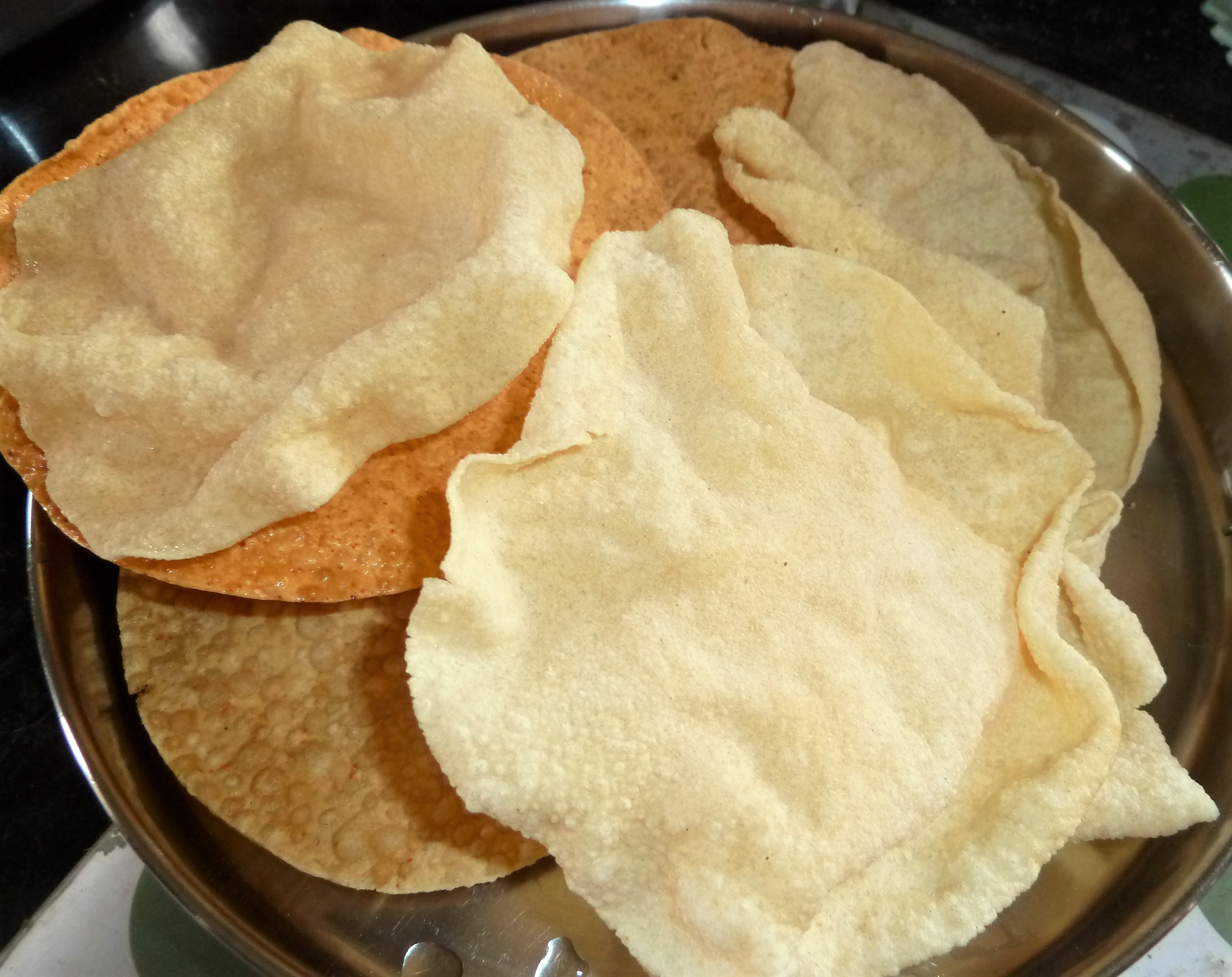 అప్పడాలు